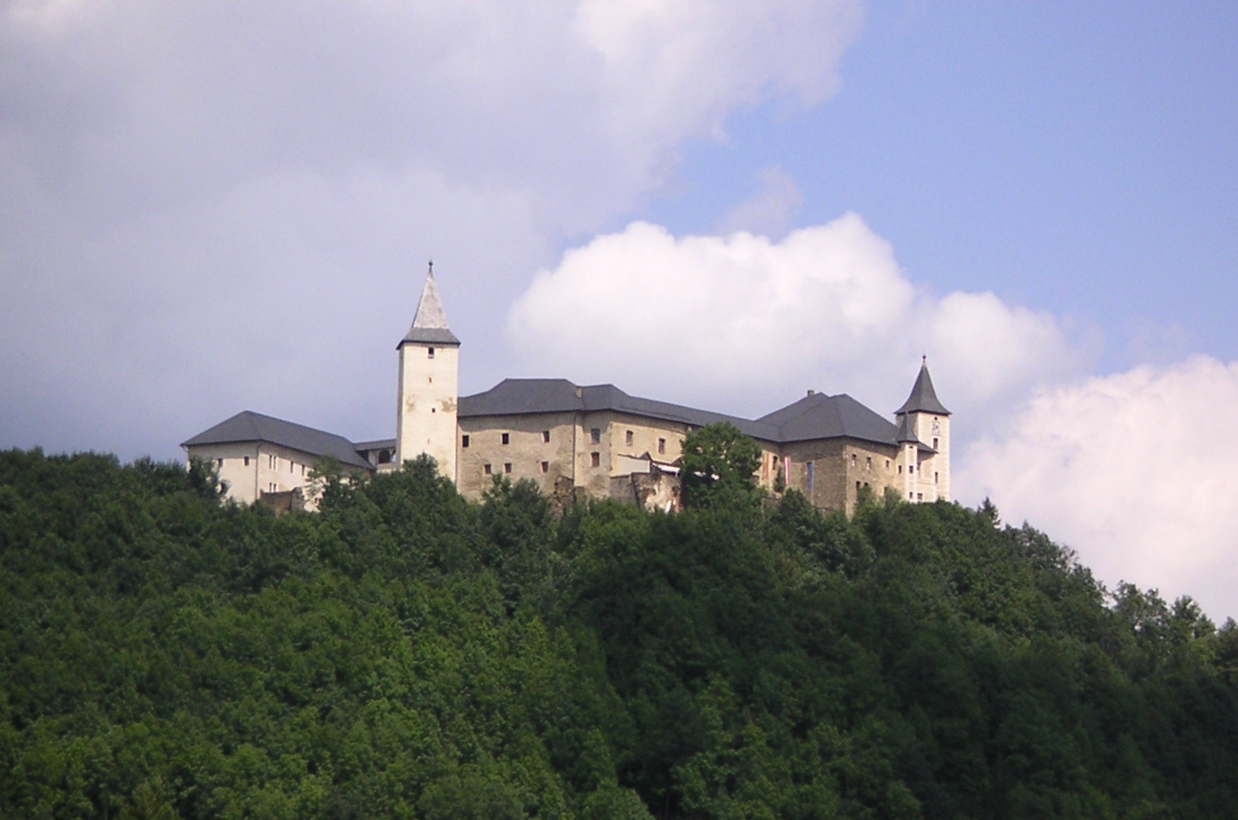 Ehemalige erzbischöfliche Festung von Straßburg in Kärnten